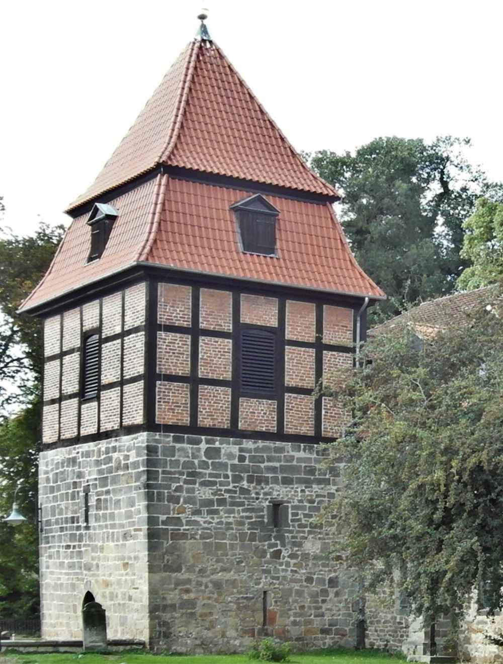 Turm der St.-Vituskirche in Wilkenburg. Südostansicht